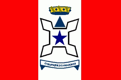 Antiga bandeira do estado do Amapá.